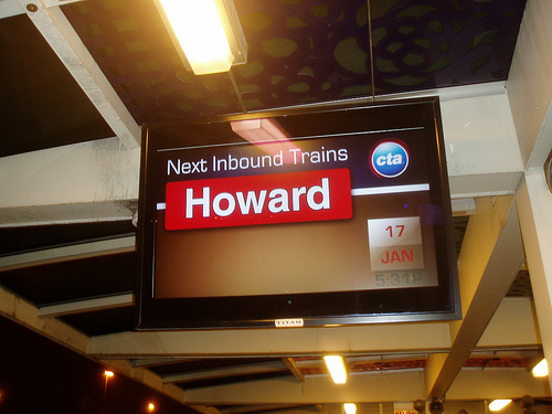 Panneuax led signal ligne rouge